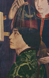 festmény